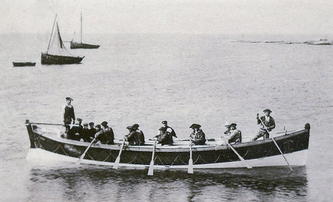 Guilvinec : le canot de sauvetage Alice vers 1915